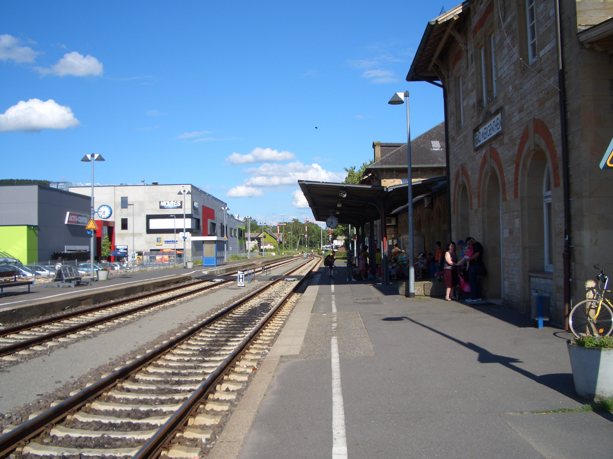 Bad Mergentheim, Bahnhof, Blick Richtung Weikersheim auf den BÜ.